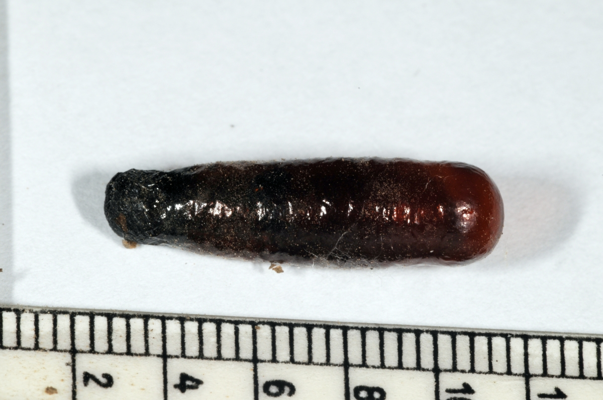 Puppenhülle von Sceliphron curvatum, Wiesbaden, Hessen, Deutschland